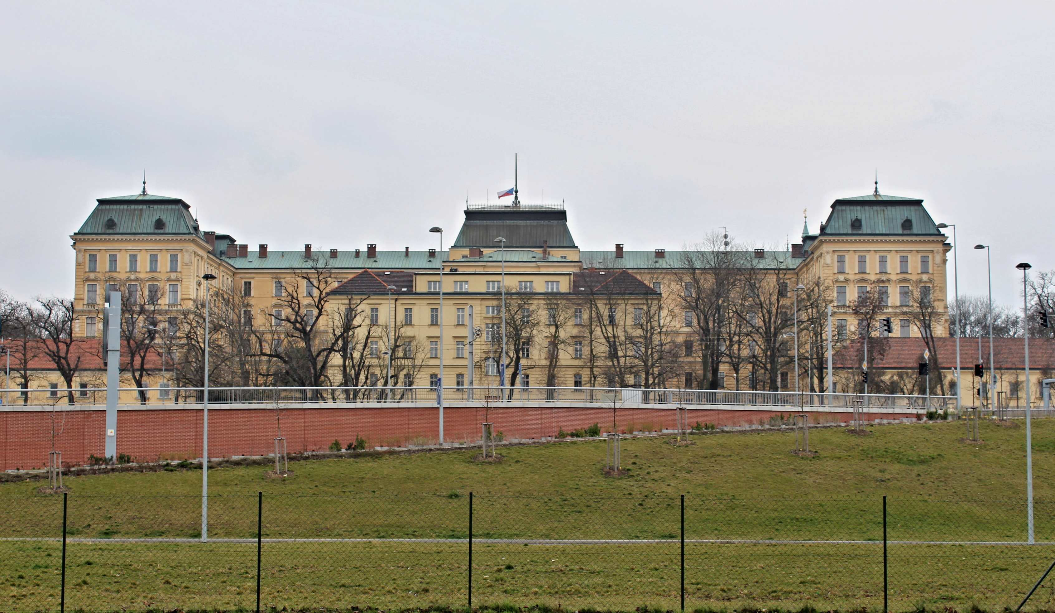 Praha-Hradčany, Kadetní škola Ministerstva obrany